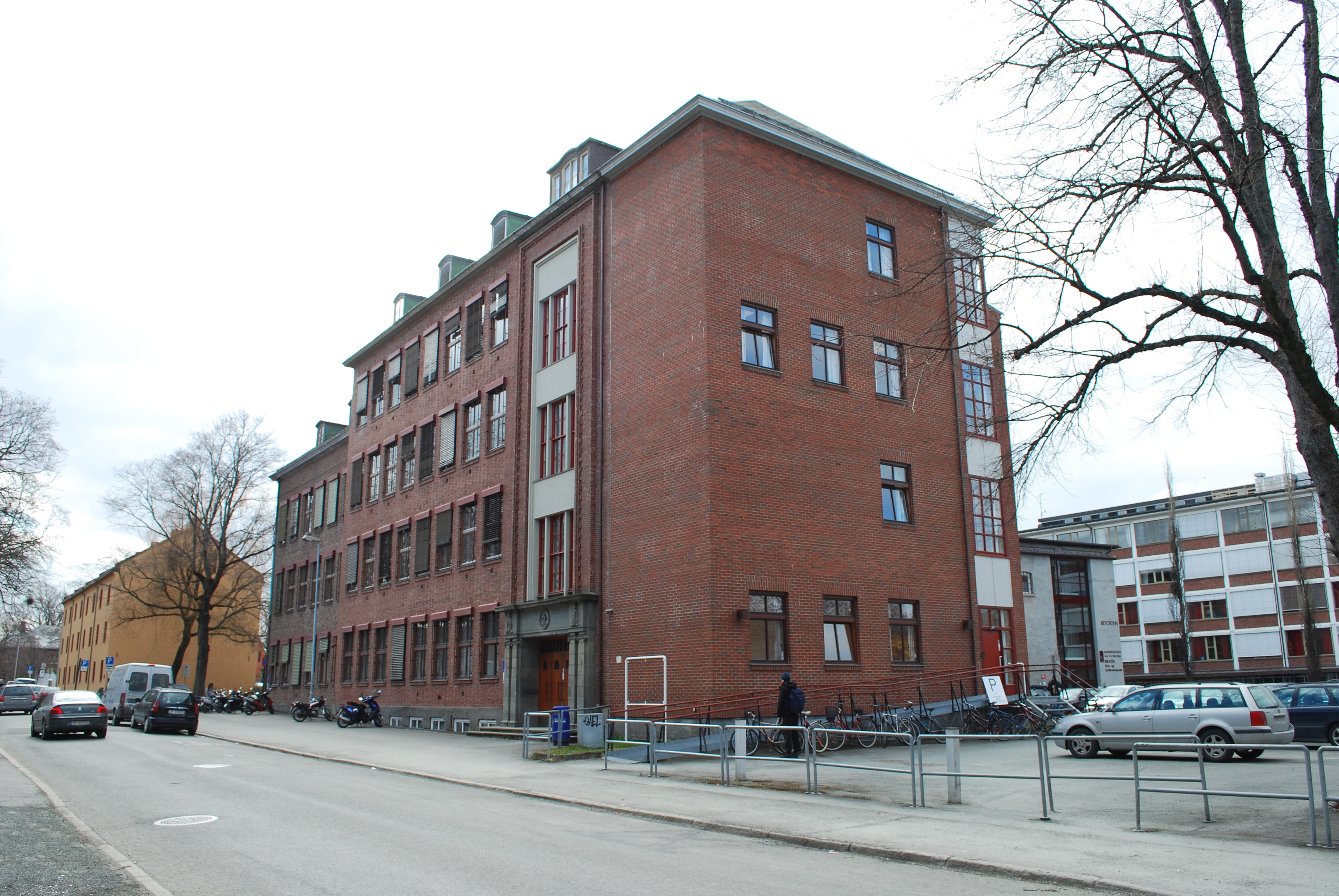 Trondheim ingeniørhøgskole ved Sverres gate i Trondheim. Fra 1994 en del av HIST.